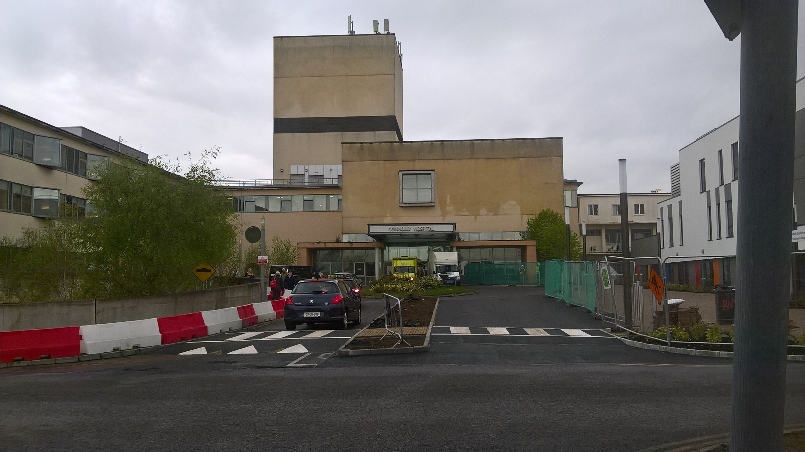 Príomhshlí isteach go hOspideal Uí Chonghaile, Baile Bhlainséir, Baile Átha Cliath 15.